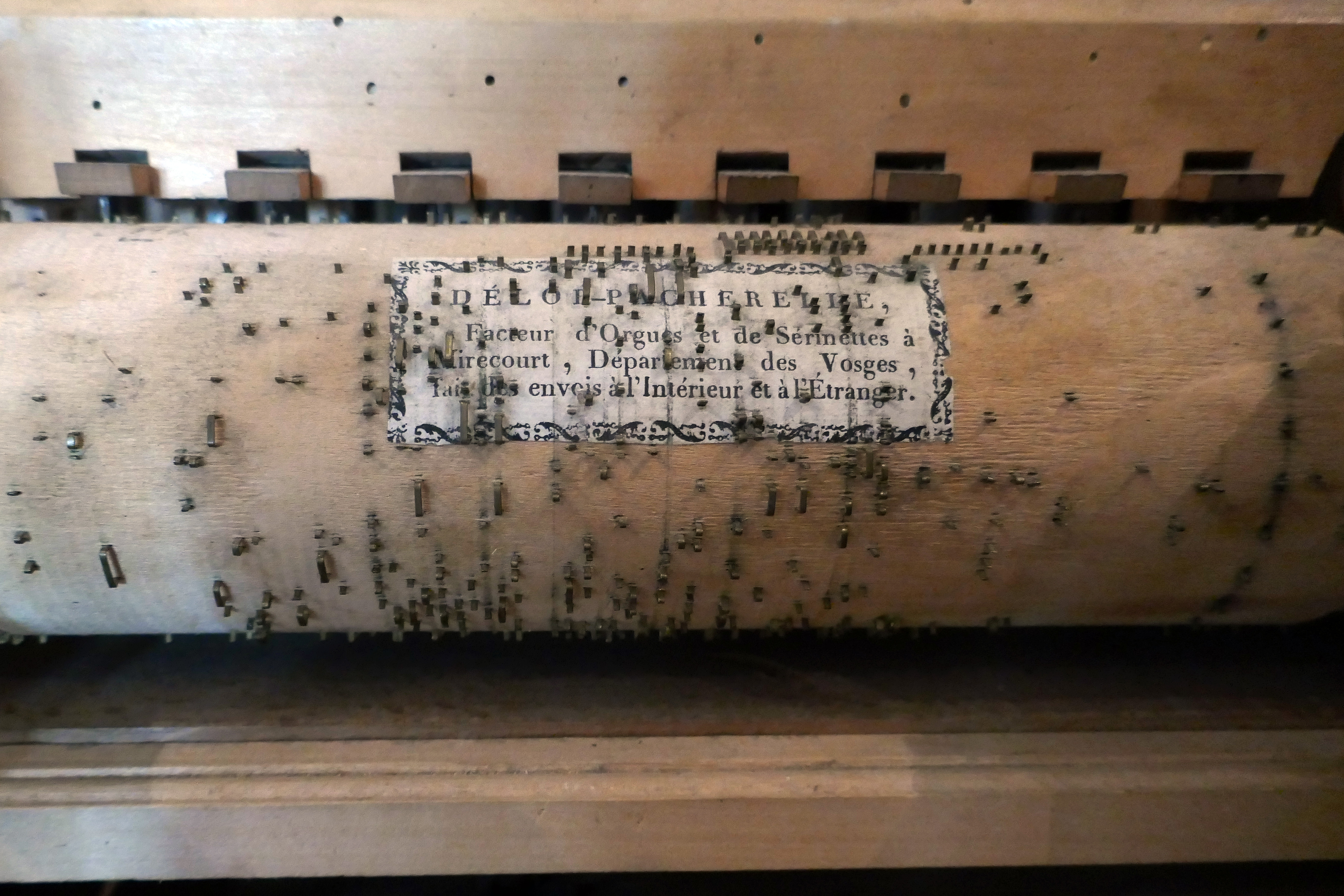 Perroquette (rouleau à picots) Delor-Pacherelle, facteur d'orgues et de sérinettes à Mirecourt Mirecourt, fin du XVIIIe siècle 30 tuyaux, 3 registres et 3 cylindres interchangeables Maison de la musique mécanique et de la dentelle de Mirecourt (Vosges)